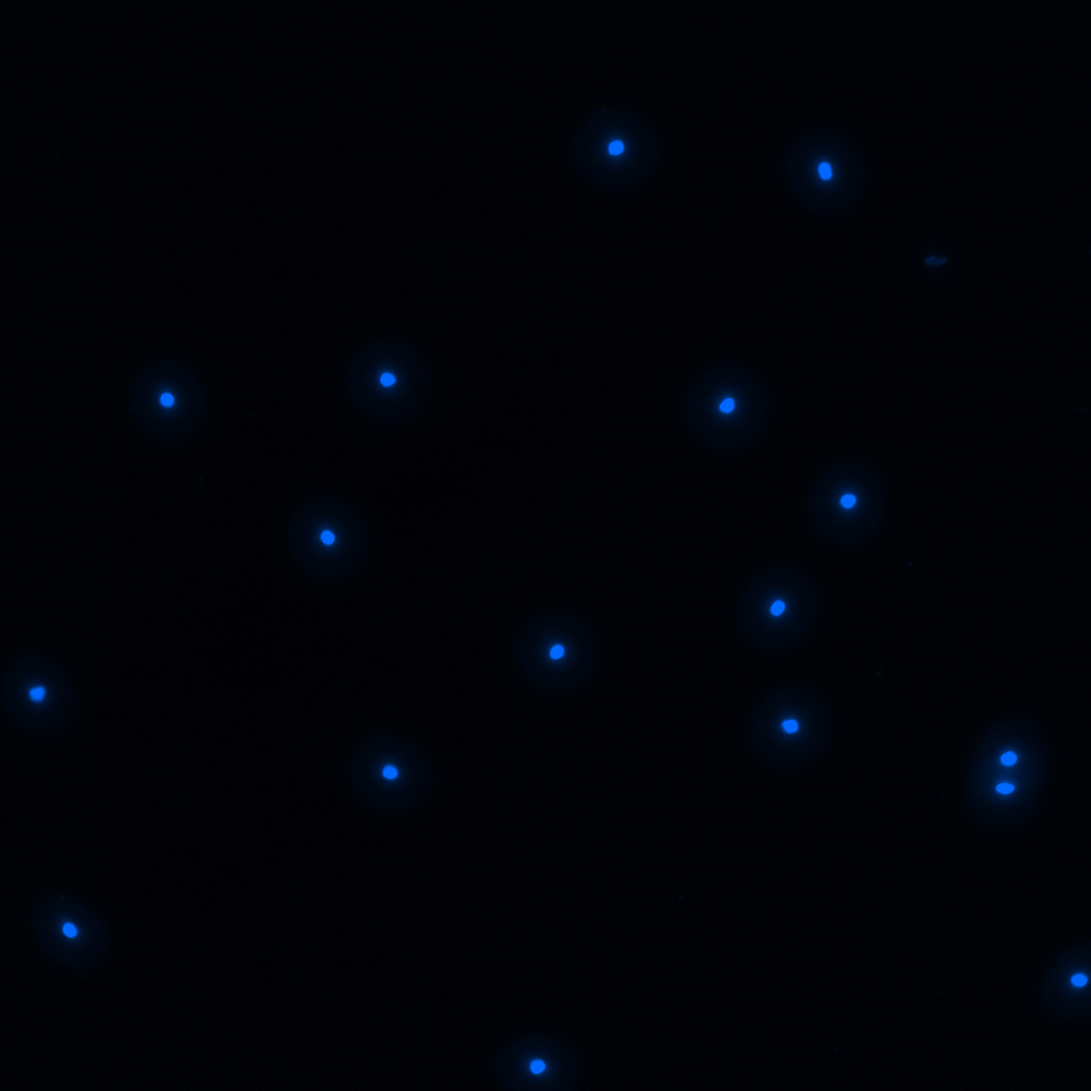 Jądra leukocytów człowieka wyznakowane barwnikiem DAPI (zdjęcie spod mikroskopu fluorescencyjnego)